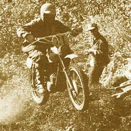 1973 - Mezinárodní motocyklová šestidenní Delton, USA